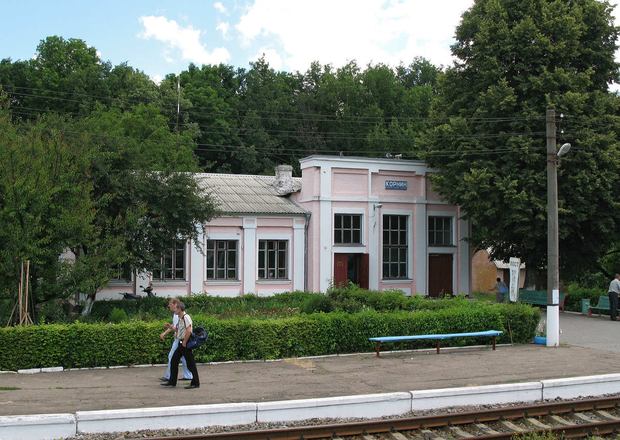 Корнин